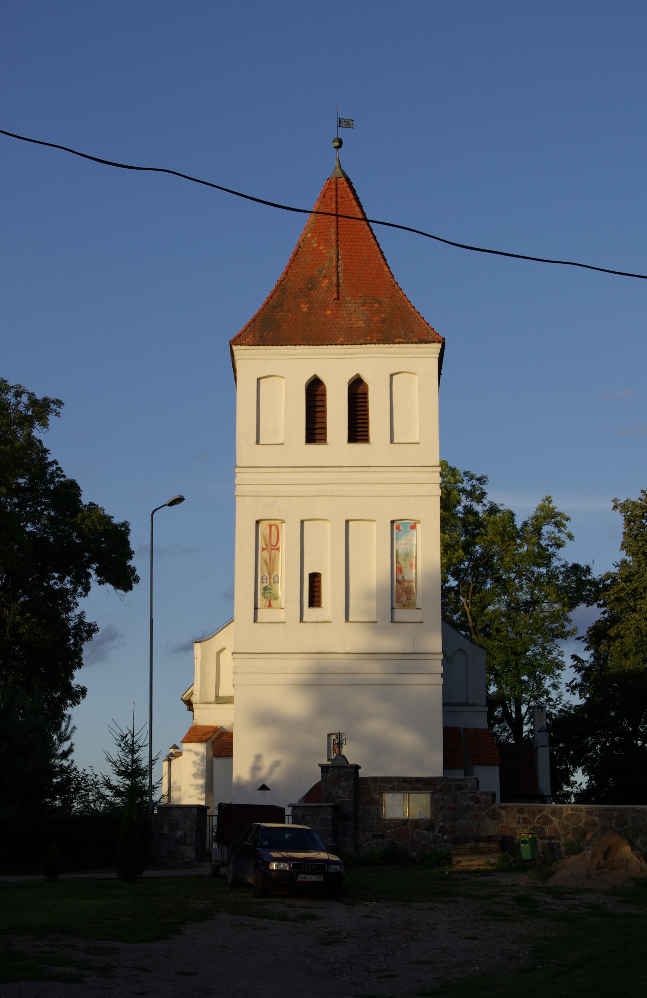 Węgielsztyn